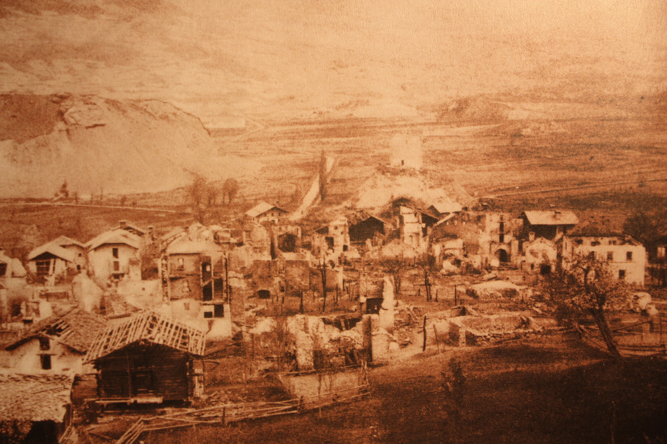 Incendie de Chalais (Suisse) en 1892